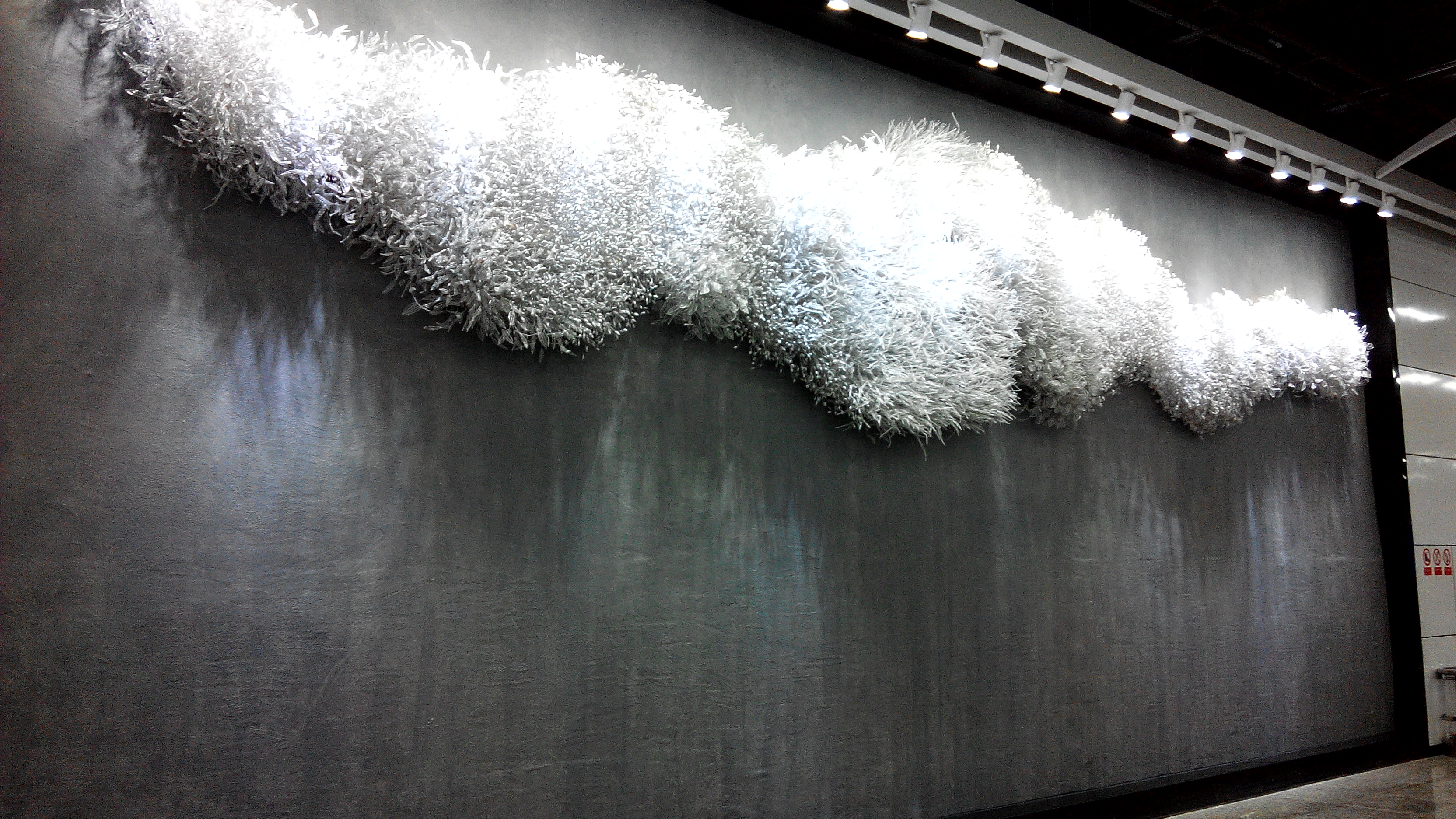 深圳地铁9号线 下沙站站厅文化墙